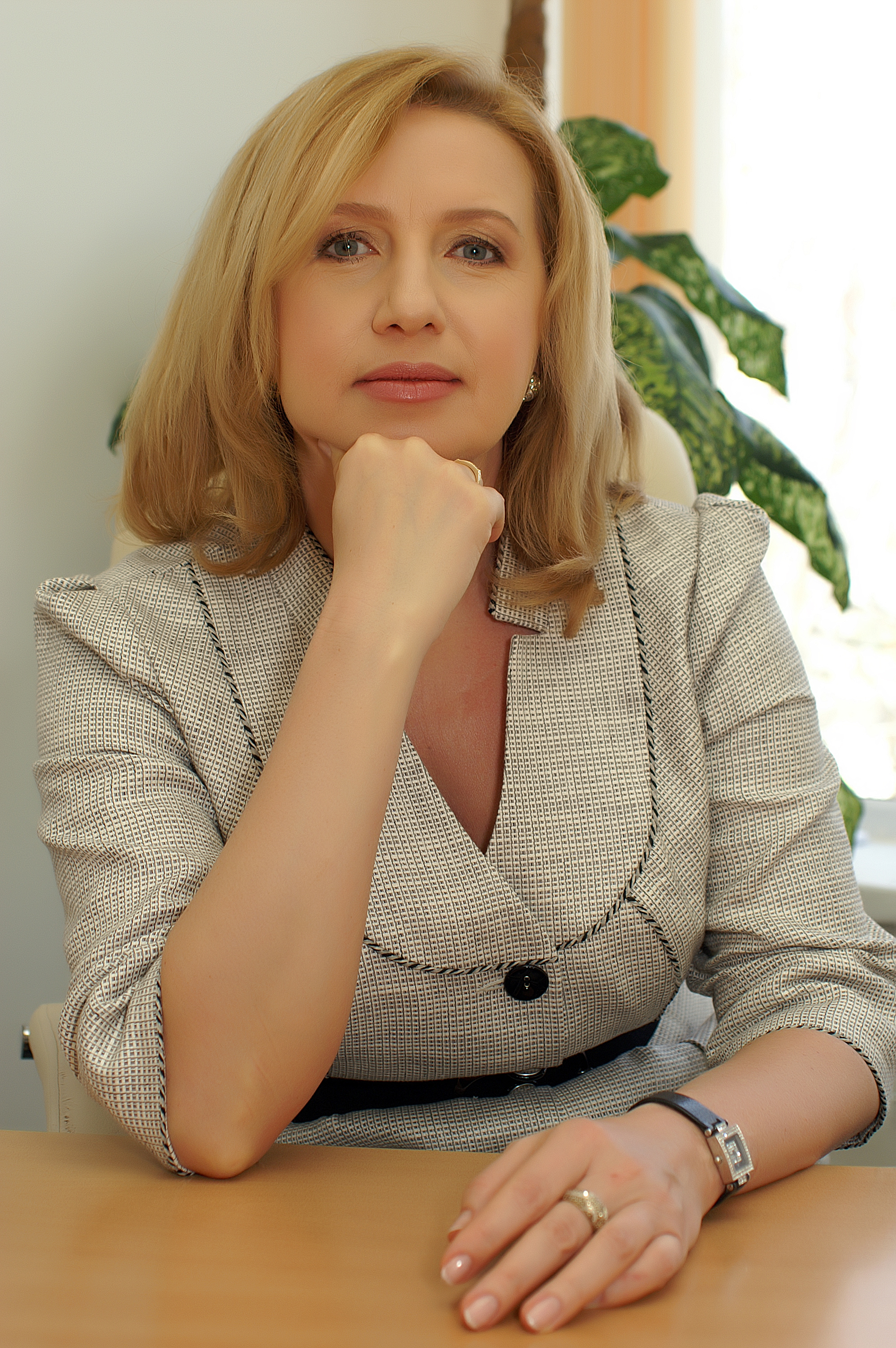 Уварова Світлана Геннадіївна (2010)